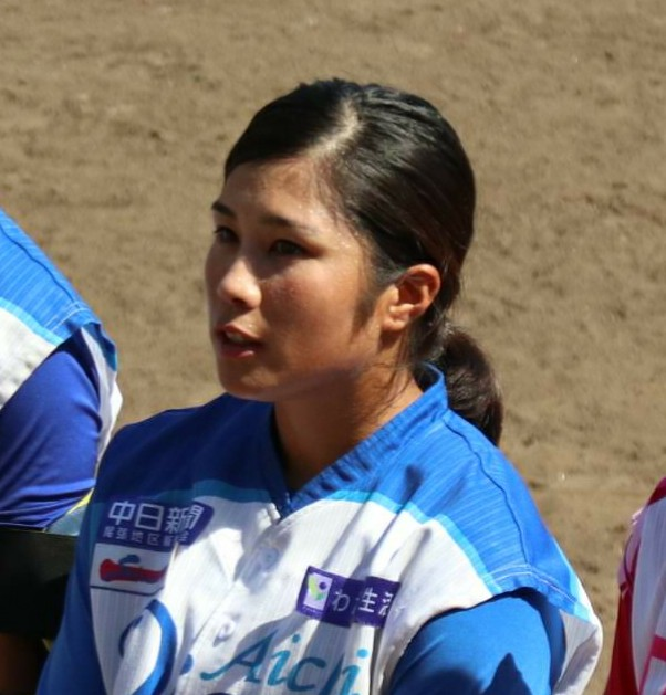 前田桜茄選手baseball